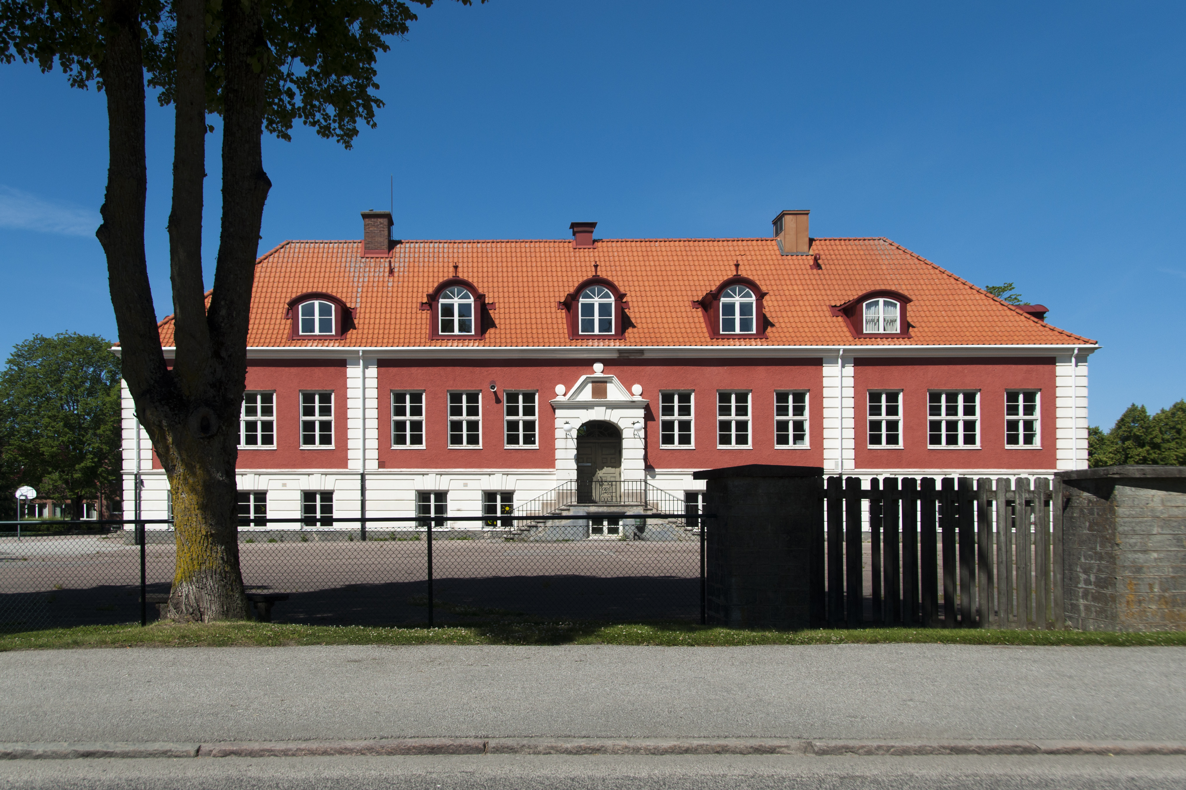 Prästgårdsskolan, Götene. Ursprungligen Centralskolan. Byggår 1921. Arkitekt Erik Karlgren